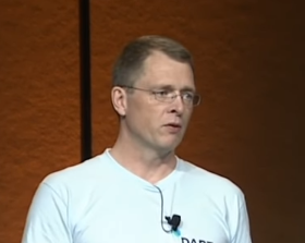 Computer programmer